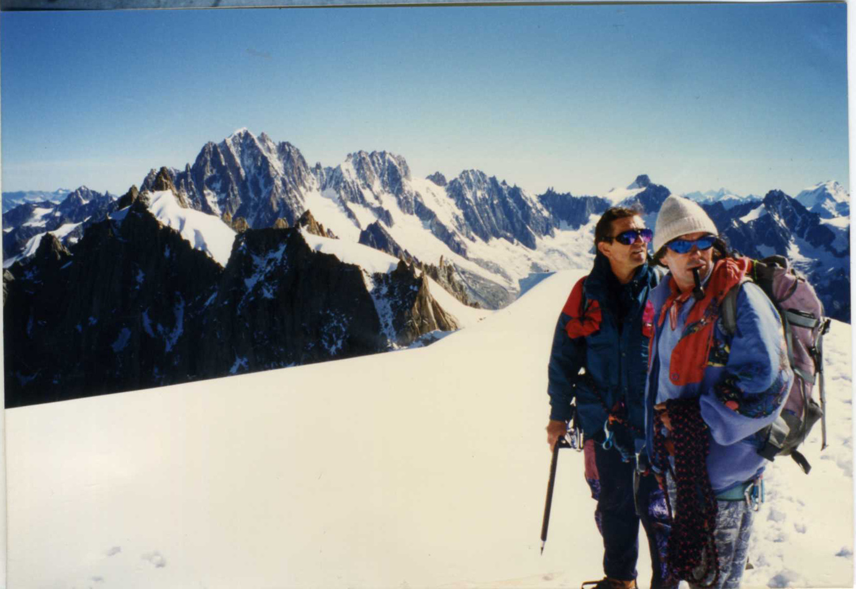 Course glaciaire dans le Massif du Mont Blanc